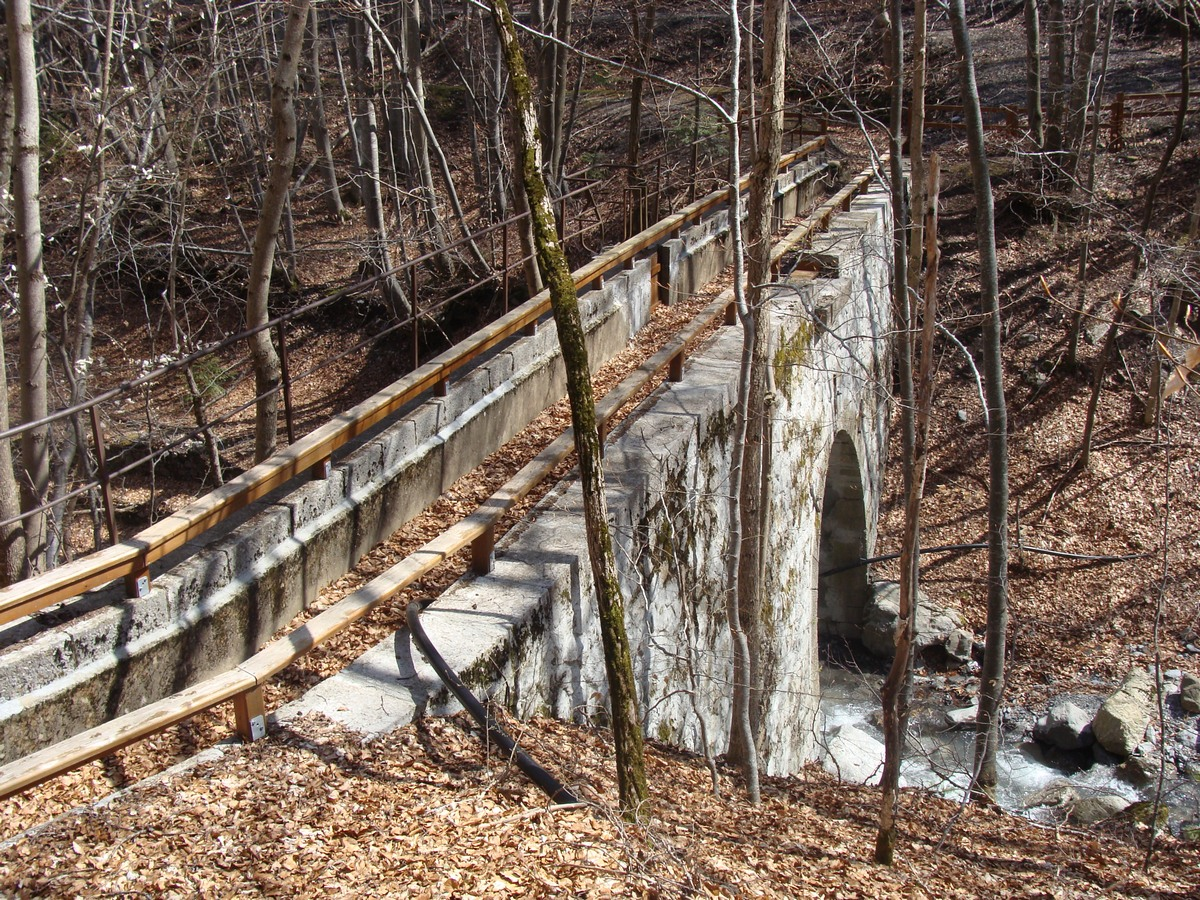 Franchissement du torrent de la Fare-en-Champsaur par le canal de Pont-du-Fossé, état actuel (printemps 2008). Les parapets ont été doublés par sécurité, le pont étant emprunté par un itinéraire de promenade piétonne.